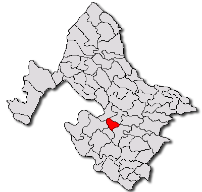 Categorie:Hărţi ale judeţului Mehedinţi